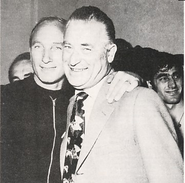 Giovanni Invernizzi e Ivanoe Fraizzoli